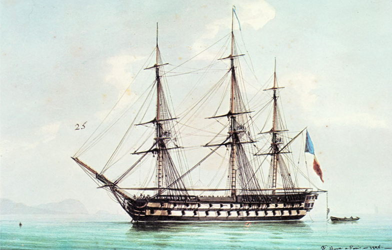 Pluton